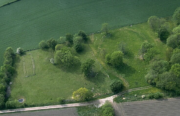 Havors fornborg och husgrund Motiv: Hablingbo 32:1 Nyckelord: Flygbilder, Riksintressen Kategori: Fornborg Havors fornborg och husgrund. Hablingbo 32:1.